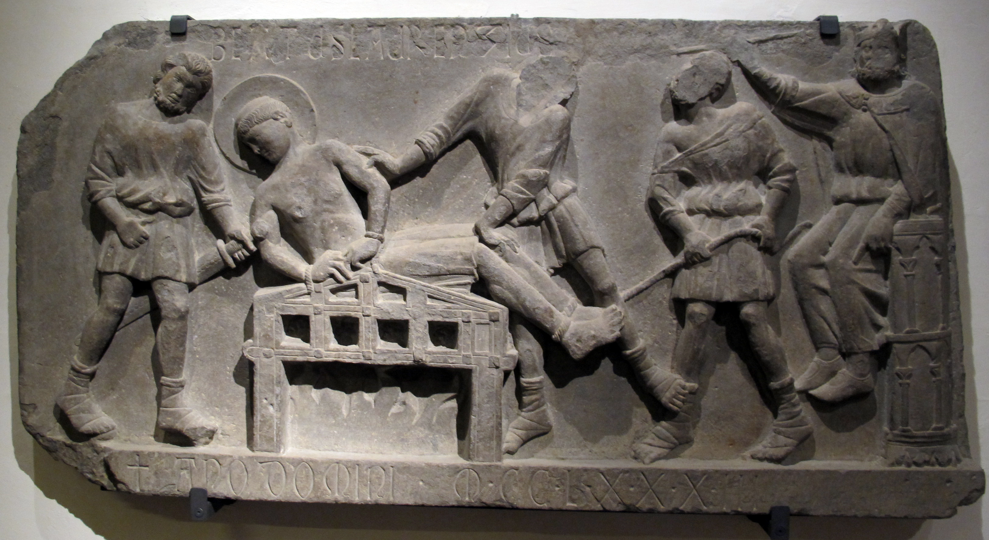 Scuola toscana del xiii sec., martirio di san lorenzo, 1283